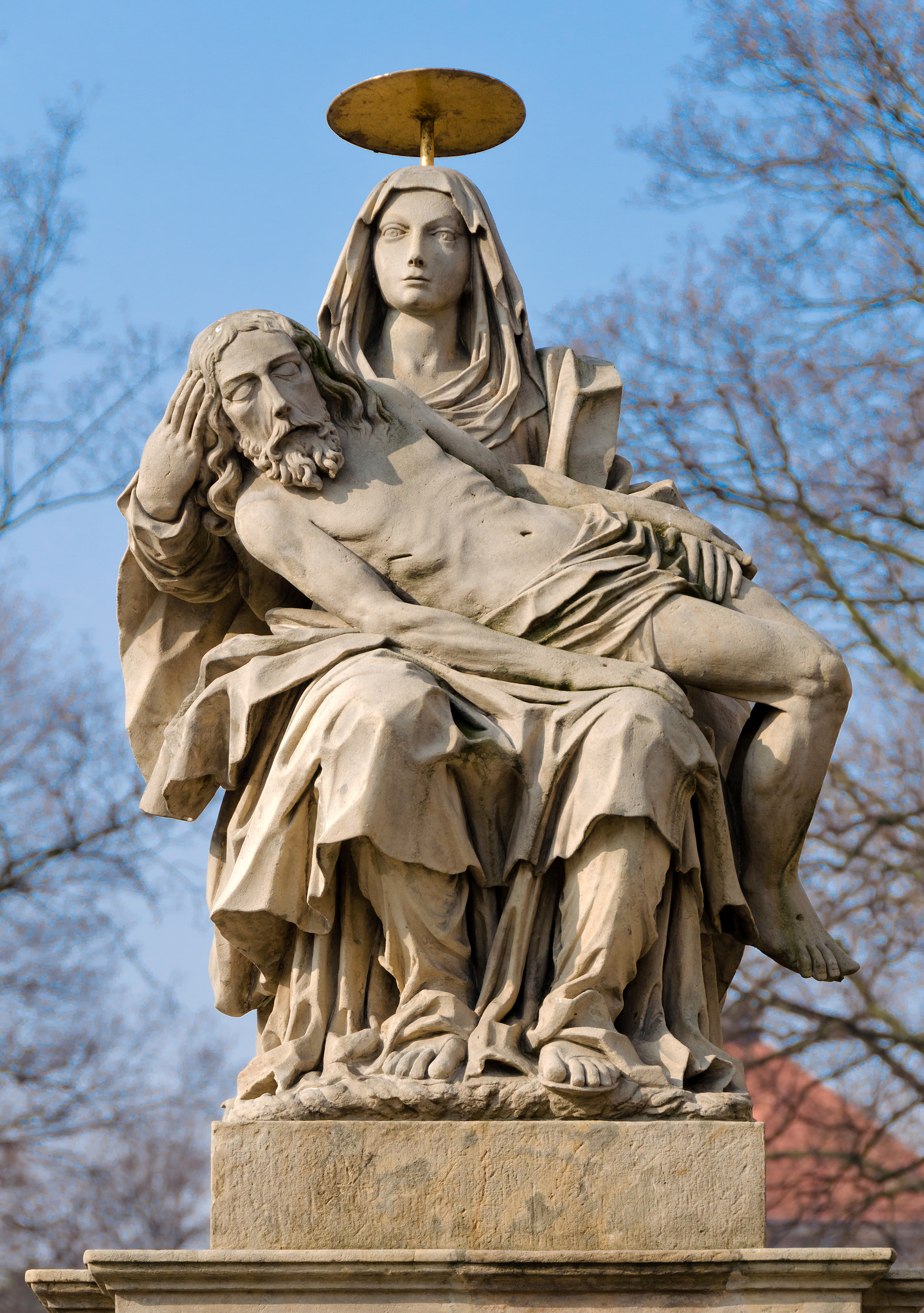 Kłodzko, most na młynówce, kon. XIV, 1628, 1701, 1750, pieta Ta fotografia przedstawia zabytek wpisany do rejestru zabytków pod numerem ID 592763